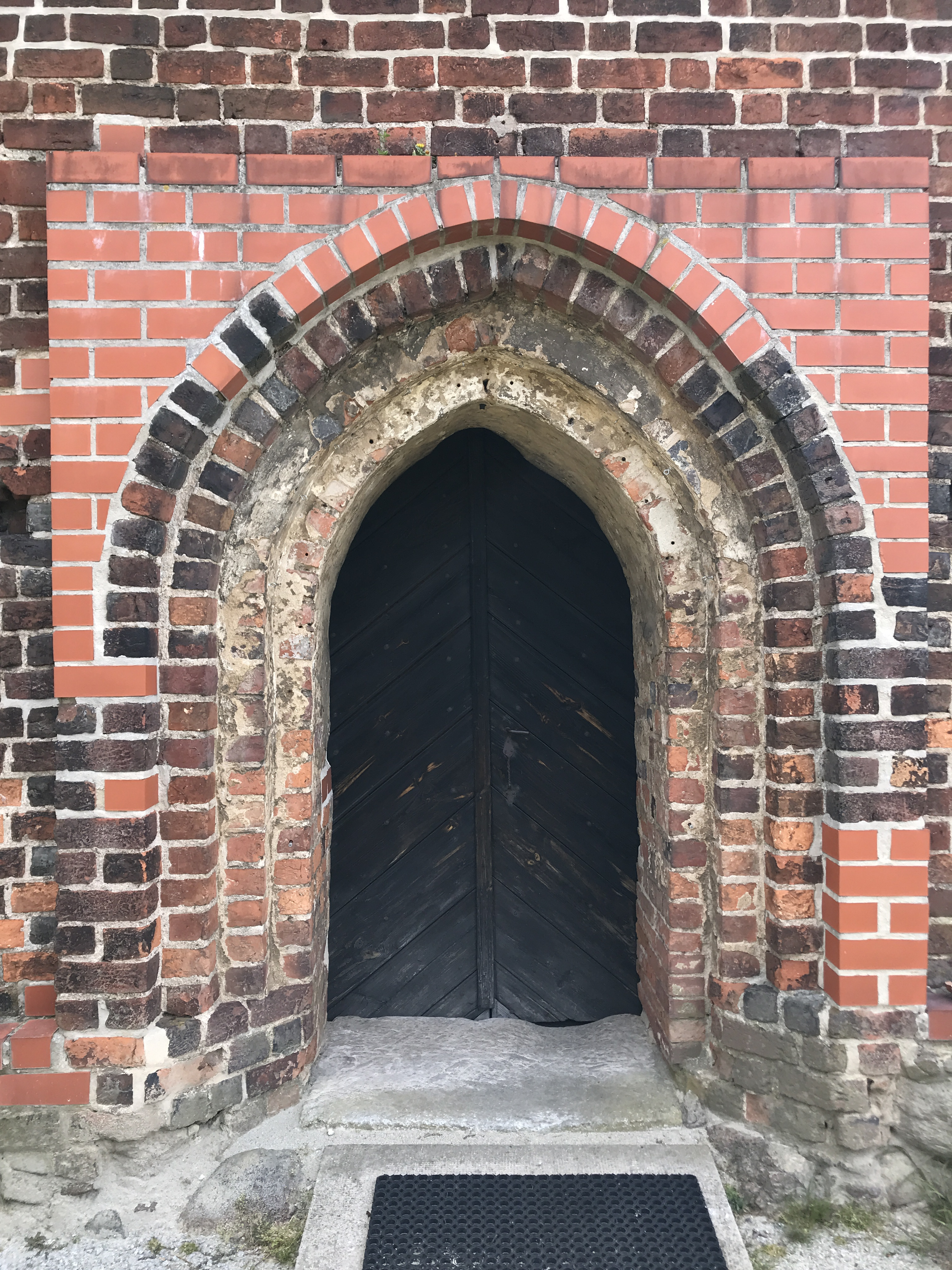 Die Dorfkirche Krieschow in der Gemeinde Kolkwitz im Landkreis Spree-Neiße ist eine Saalkirche aus dem 15. Jahrhundert. Im Innern steht unter anderem ein Altarretabel aus dem Jahr 1680.